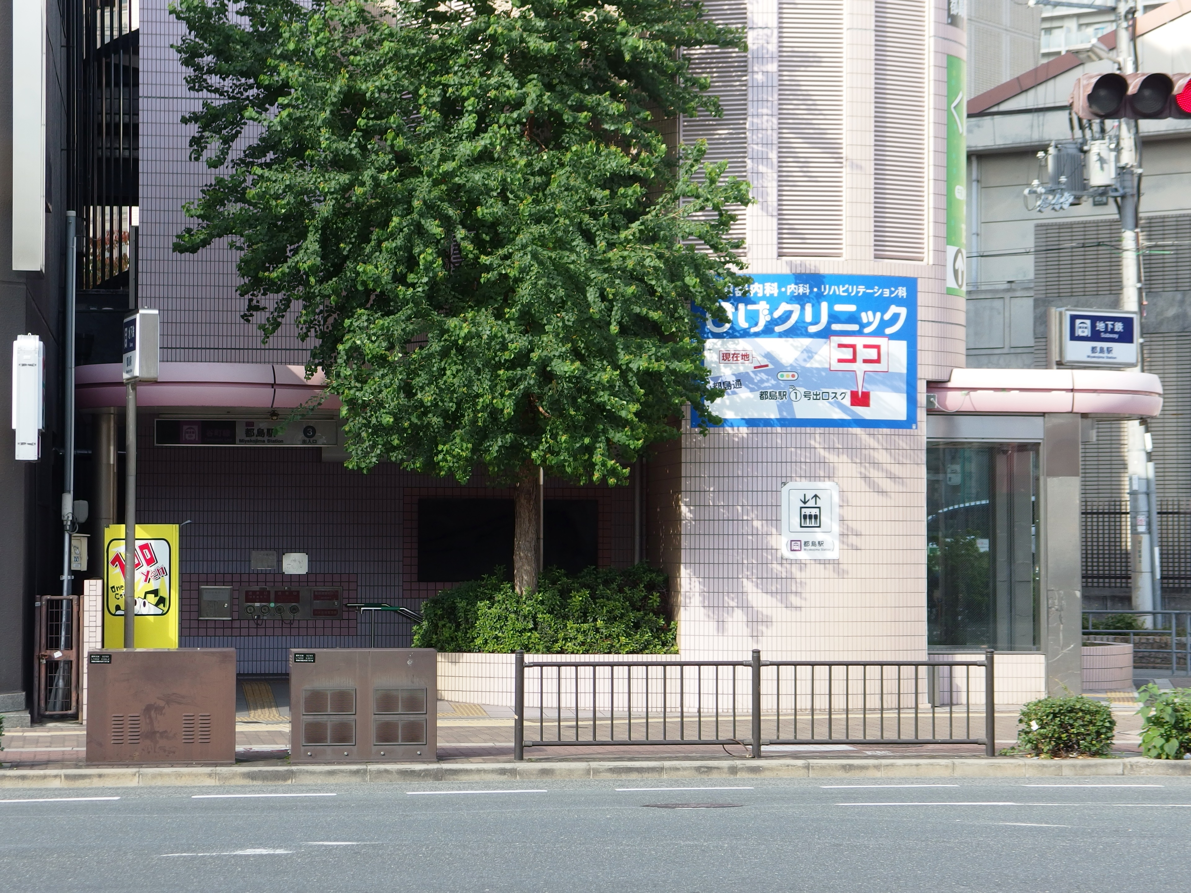 大阪市営地下鉄谷町線 都島駅3号出入口, 大阪府, 大阪市